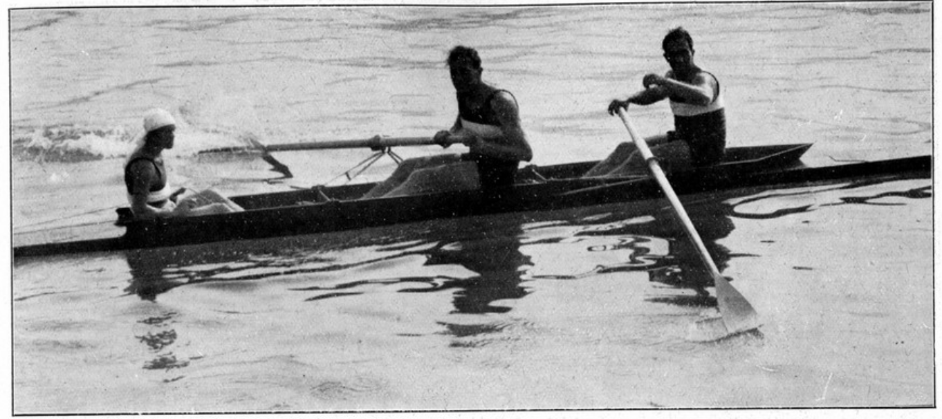 I fratelli Renzo Vestrini e Pier Luigi Vestrini nel 2 con timoniere vincitori ai Campionati italiani di canottaggio di Pallanza sul Lago Verbano nel 1929.